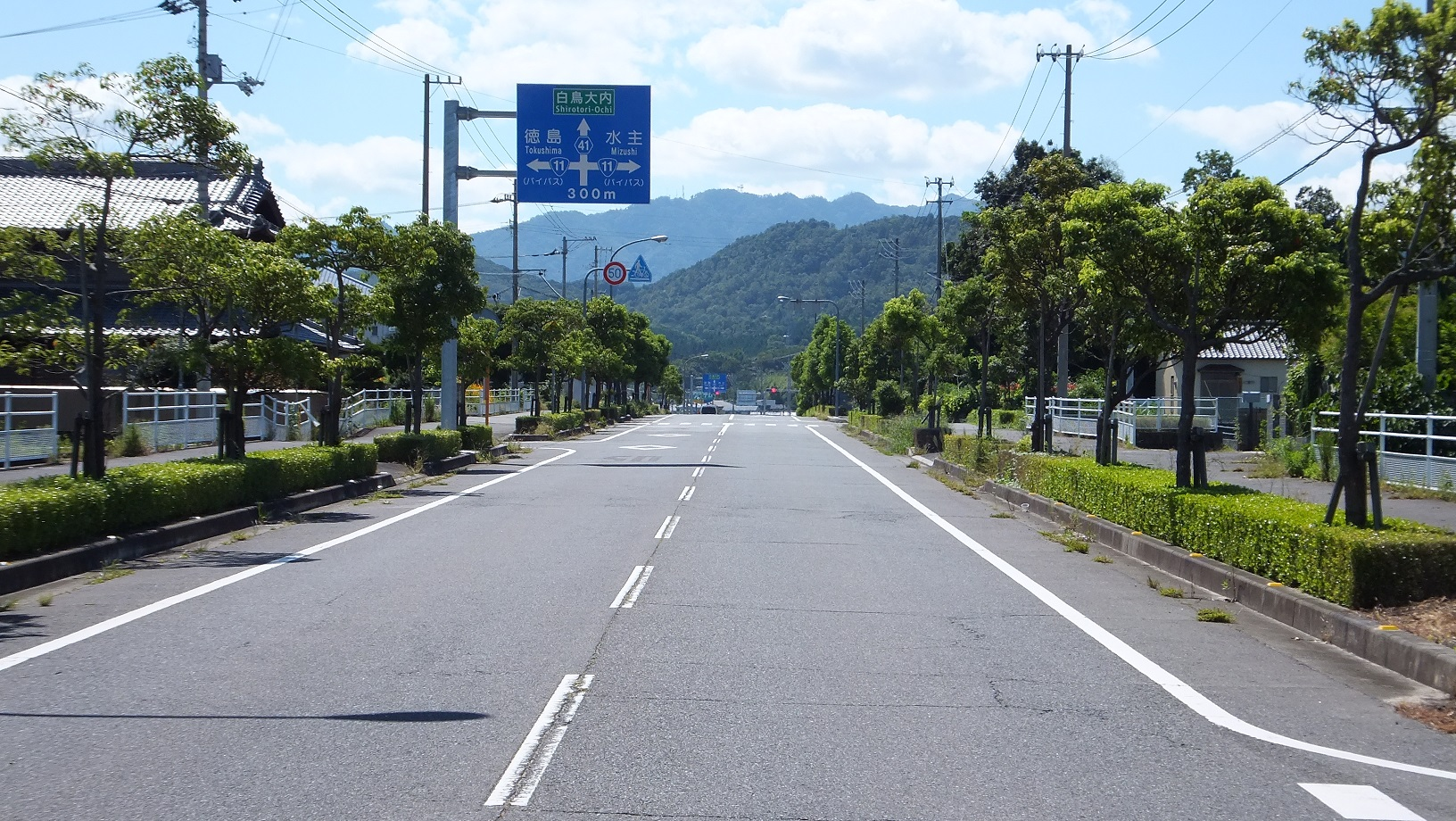 香川県道41号 （香川県東かがわ市川東）2015年9月 起点側より撮影